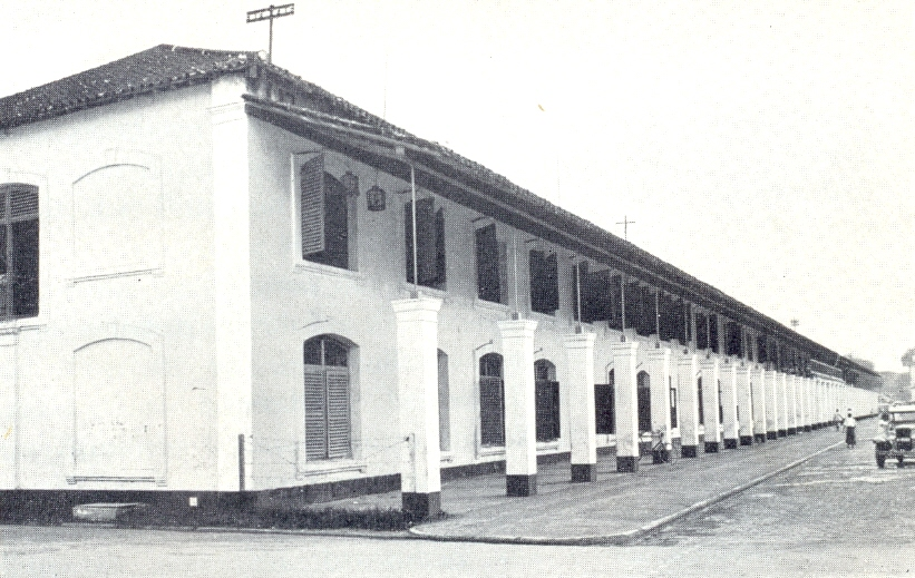 Kaserne des Kapregiments in Samarang auf Java